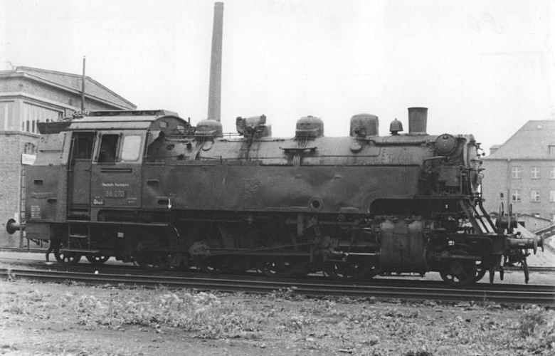 Dampflok 86 270 (BR 86) Zentralbild Schmidtke 7.8.1952 Lokomotivtypen der Deutschen Reichsbahn. UBz: Baureihe 86